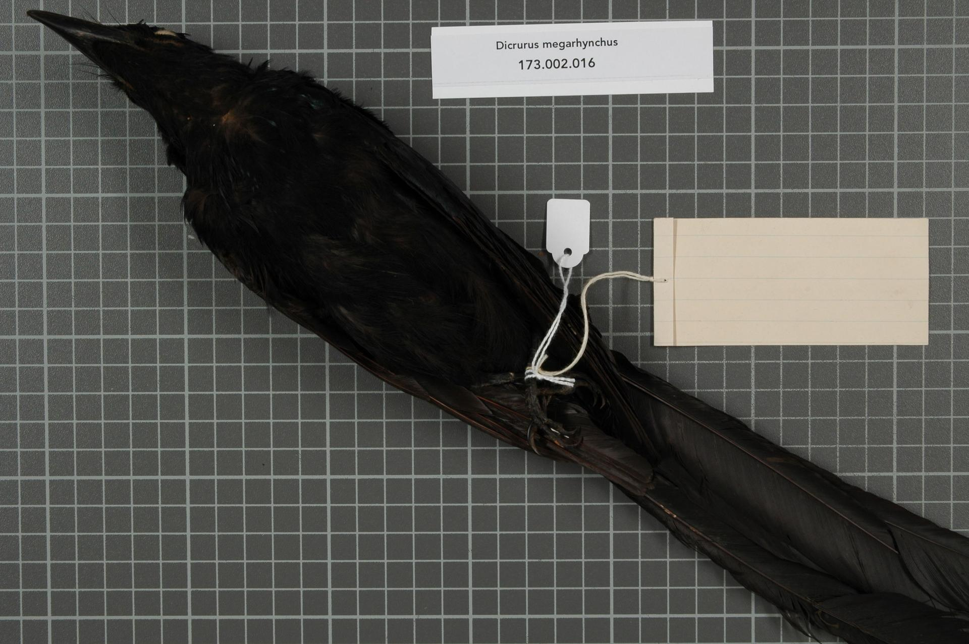 Dicrurus megarhynchus (Quoy and Gaimard, 1830)